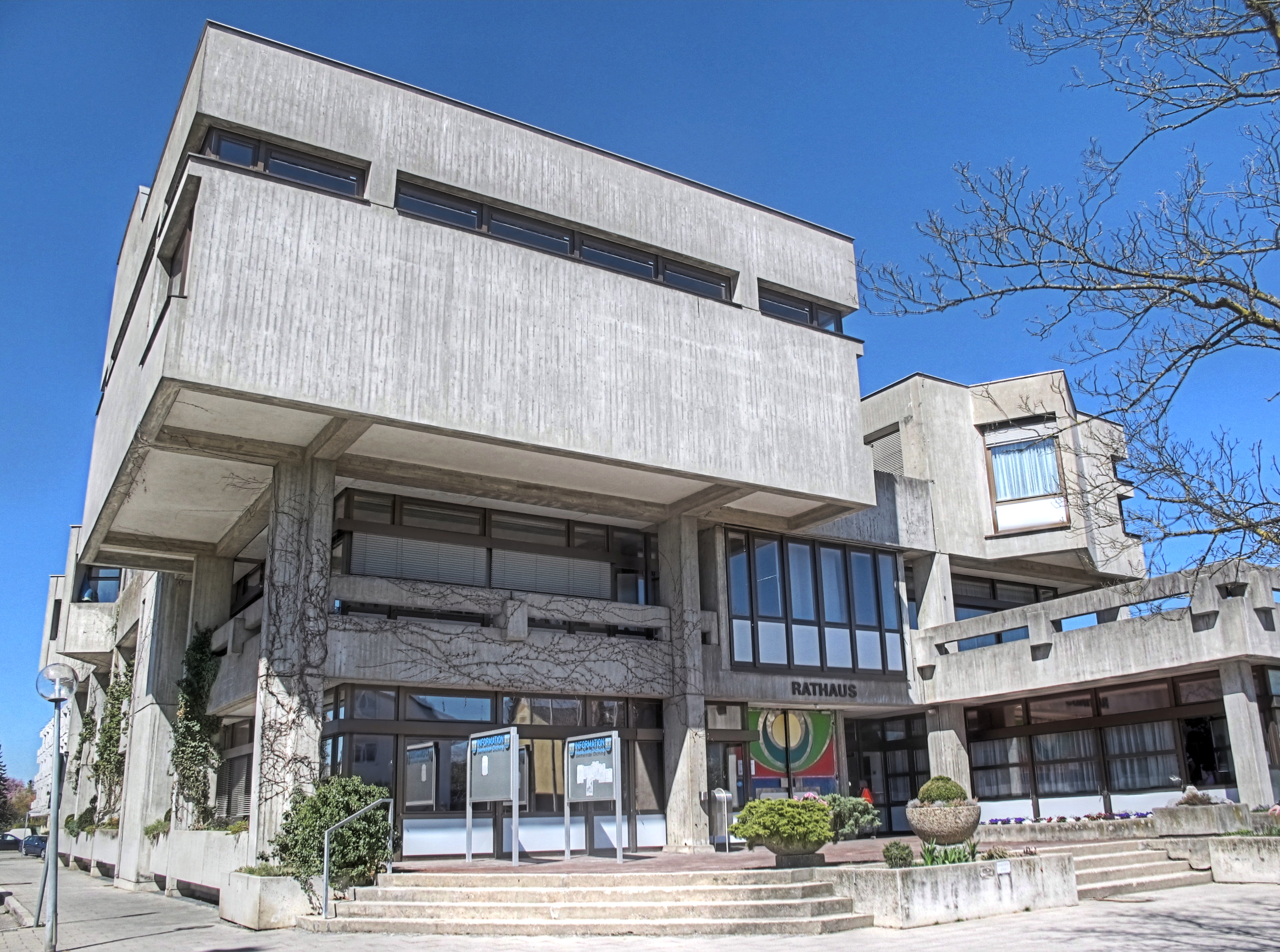 Deutschland, Bayern, Landkreis Fürstenfeldbruck, Gemeinde Olching, Rathaus in der Rebhuhnstraße 18